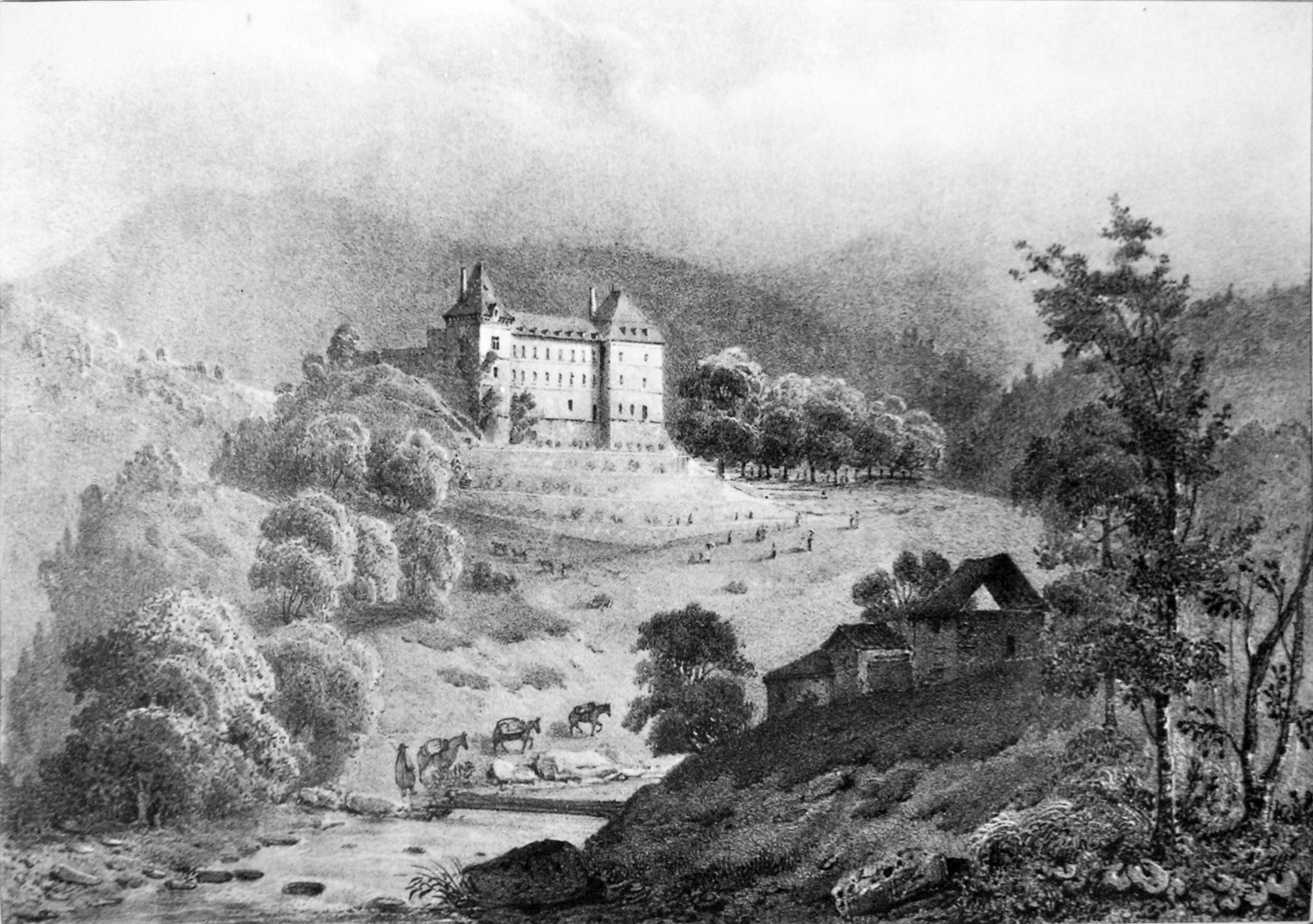 Chateau de la Motte (Isère) ATTENTION ! Ce facsimilé est réalisé en applicant des alterations avec un logiciel graphique à une copie numérique, obtenue à partir d'une prise de photo faite par un non-professionnel. Elle pourrait ne pas être parfaitement réussie.